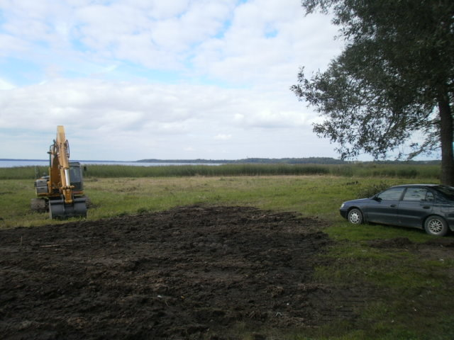 Vaade linnuse eest üle järve Burtnieki kiriku poole.